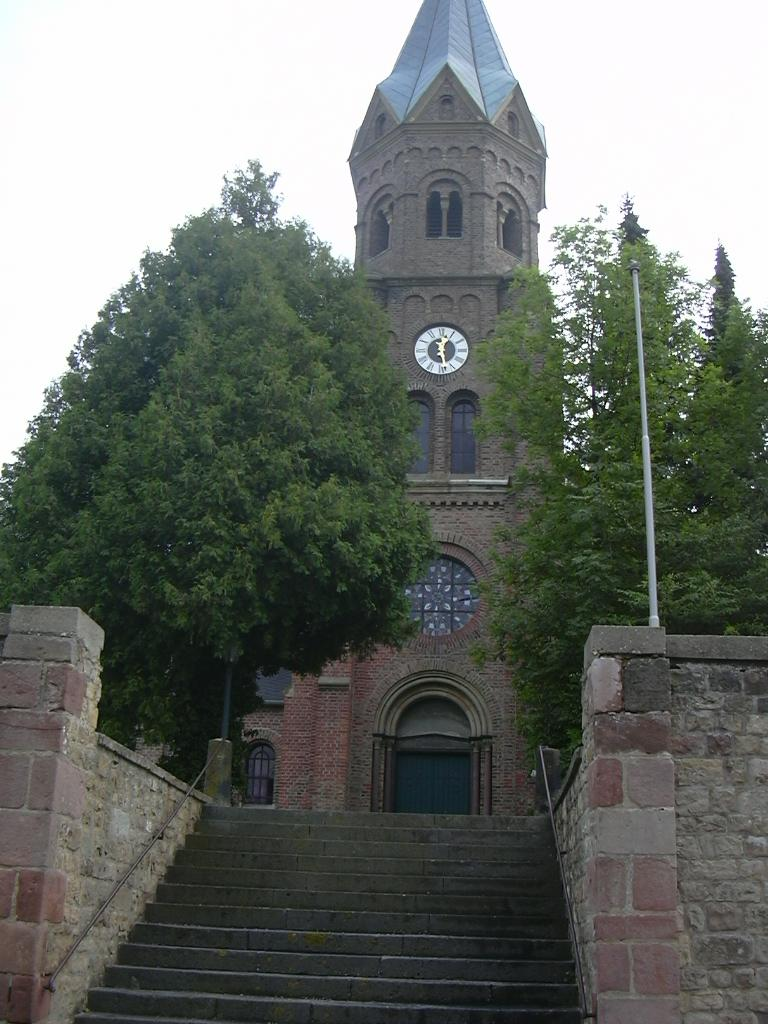 Froitzheim (Vettweiß), Kirche own work papa1234 2006-08-12